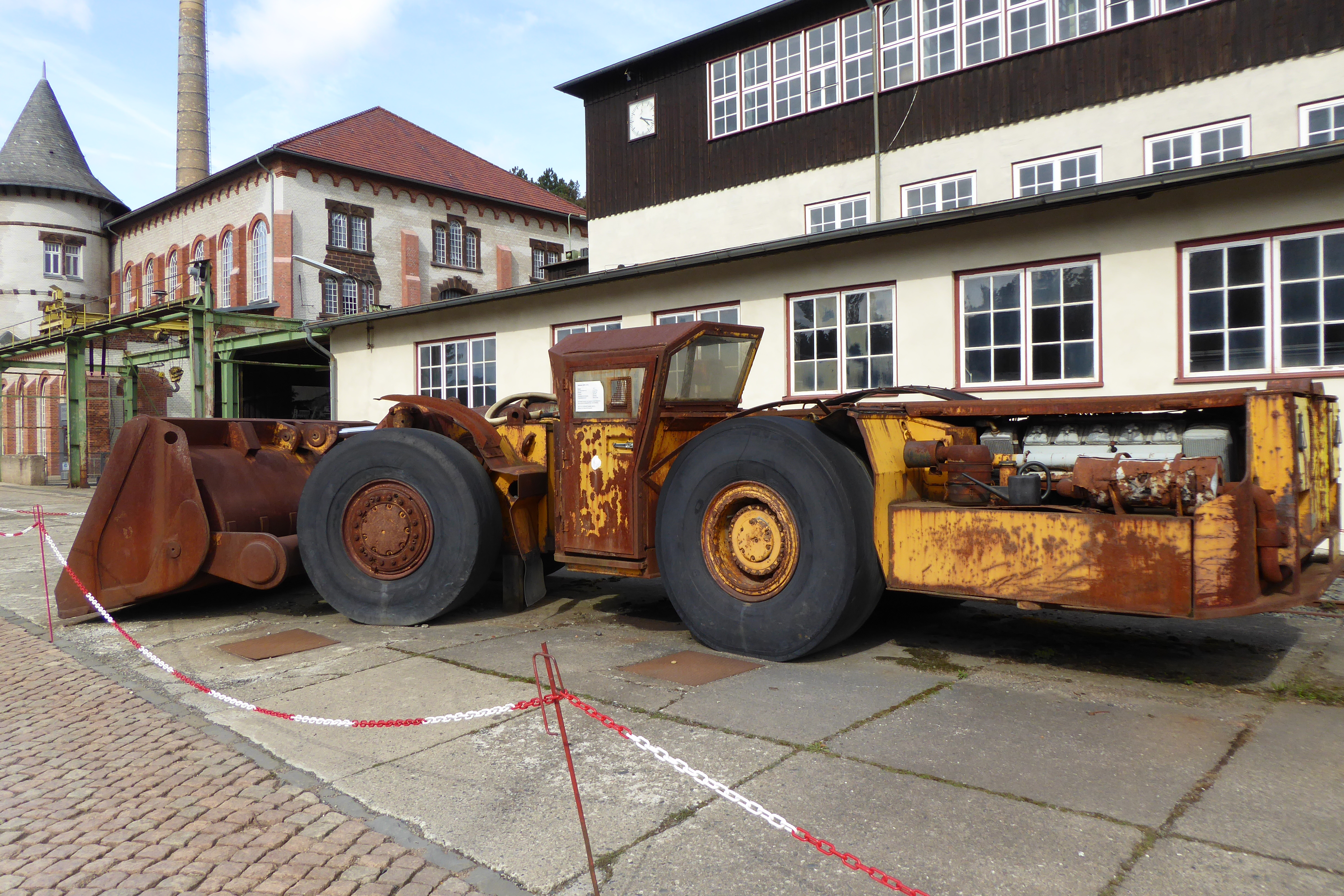 Gebäude und Technik am Bergwerk Rammelsberg in Goslar; das Bergwerk ist als Weltkulturerbe geschützt Radlader GHH LF-8